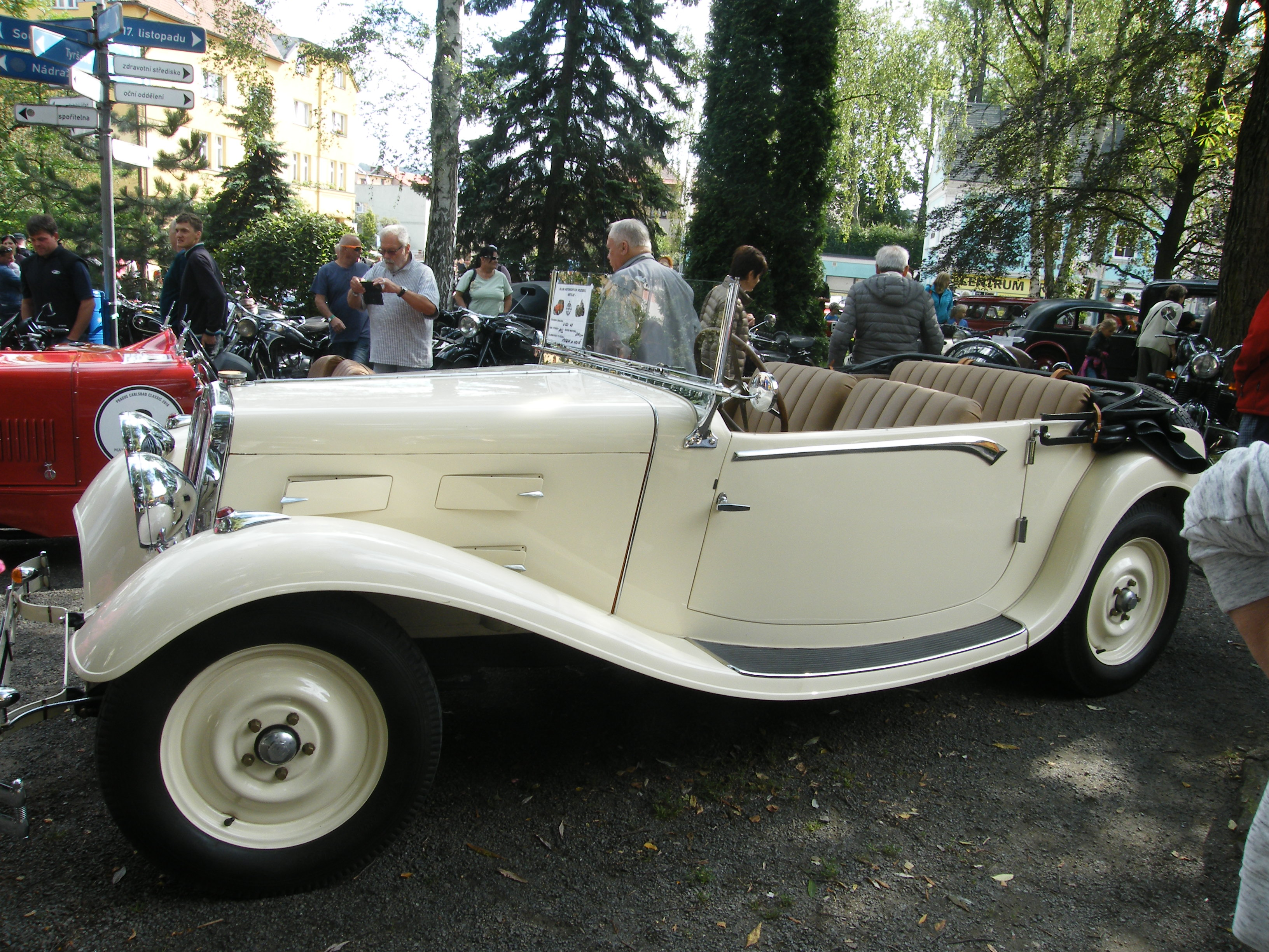 Wikow 40 roadster